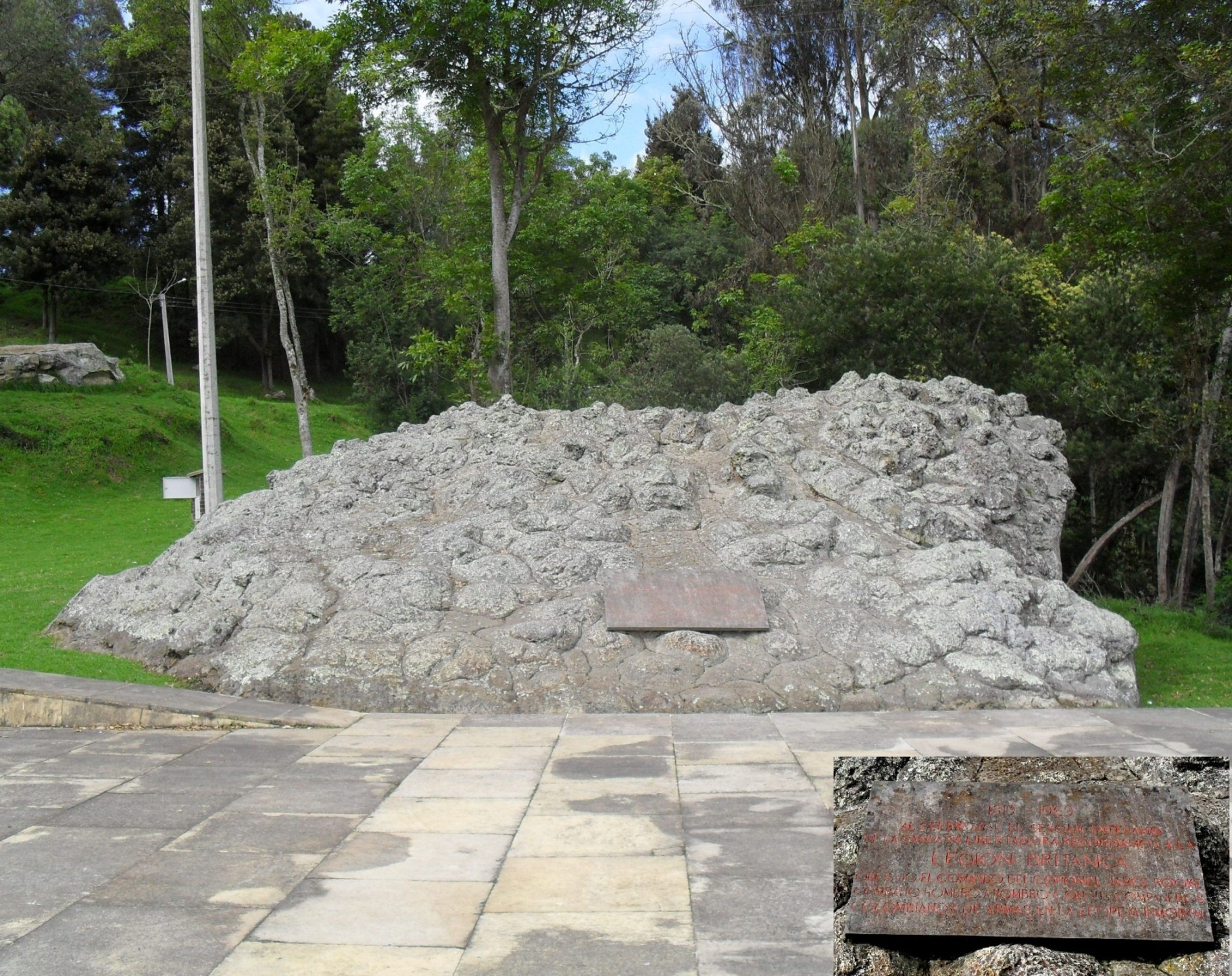 Monumento a la Légión Británica, que participo en la guerra de independencia de Nueva Granada en el puente de Boyacá